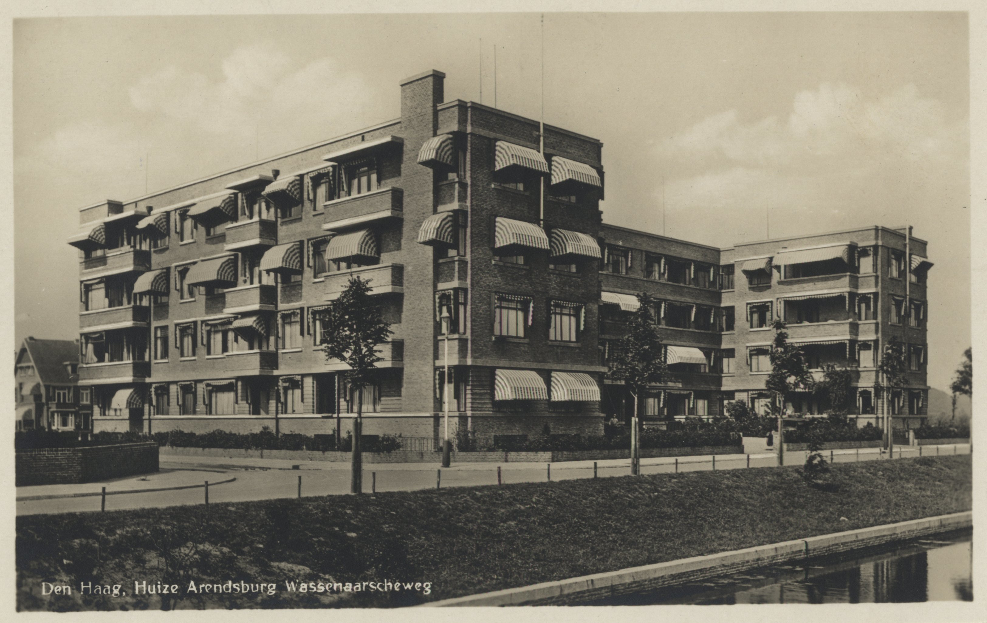 Wassenaarseweg 102, flatgebouw Arendsburg Collectie Foto's Identificatienr. 0.80963 Datering ca. 1931 Opname Aantal 1 Object prentbriefkaart Afmetingen (h x b) 9 x 14 cm Uitgave Klitzsch & Co., Artur Plaatsnaam Den Haag Straatnaam Wassenaarseweg; 08; flat Arendsburg (nr. 102), Wassenaarseweg